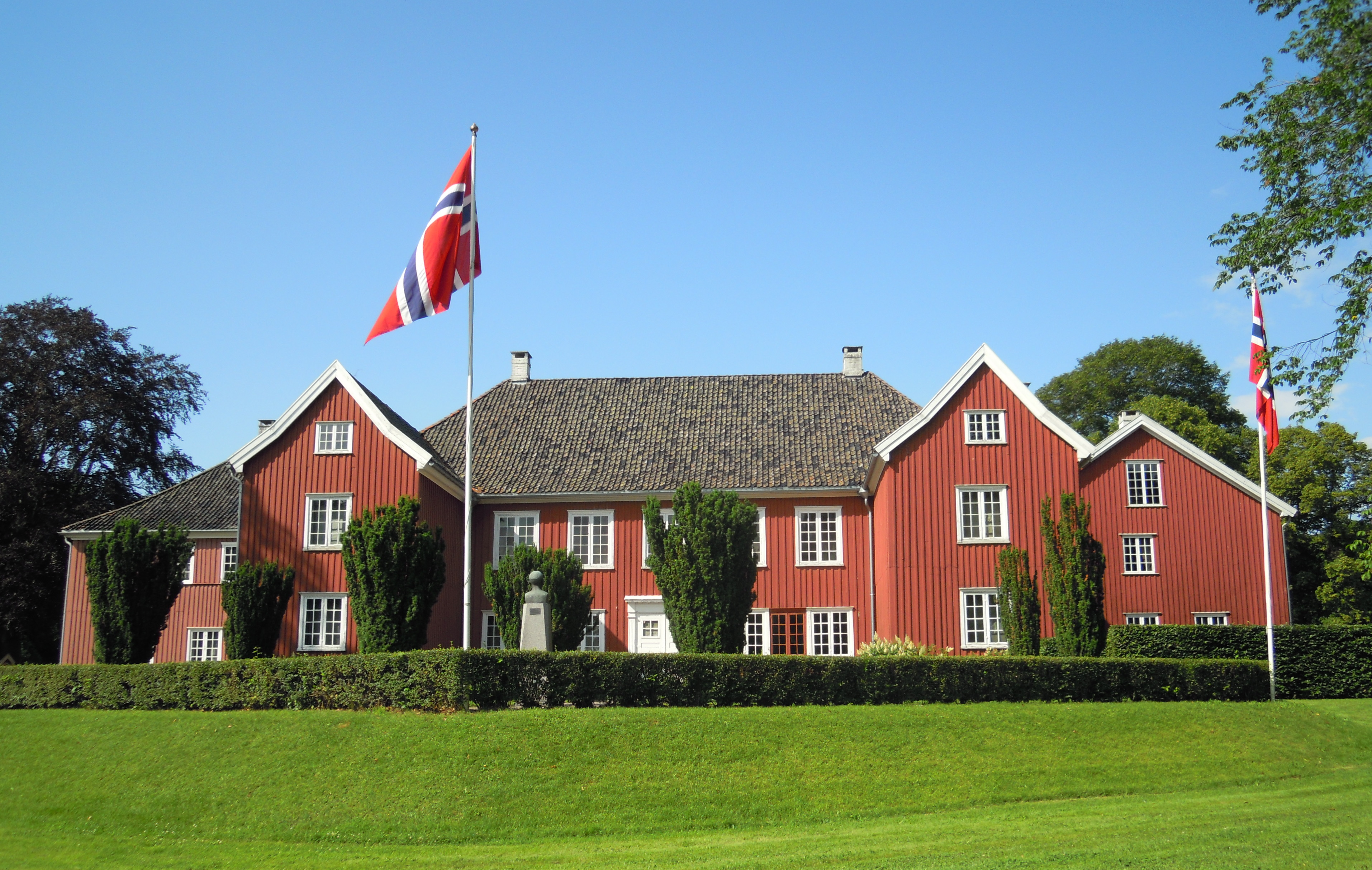 Herregården i Larvik ble bygd av Ulrik Fredrik Gyldenløve og stod ferdig i 1677. Hovedbygningen og portalen er fredet. Bygningen ble fredet så tidlig som i 1923, som en av de første etter at Bygningsfredningsloven trådte i kraft i 1920. I dag er det museum på stedet.